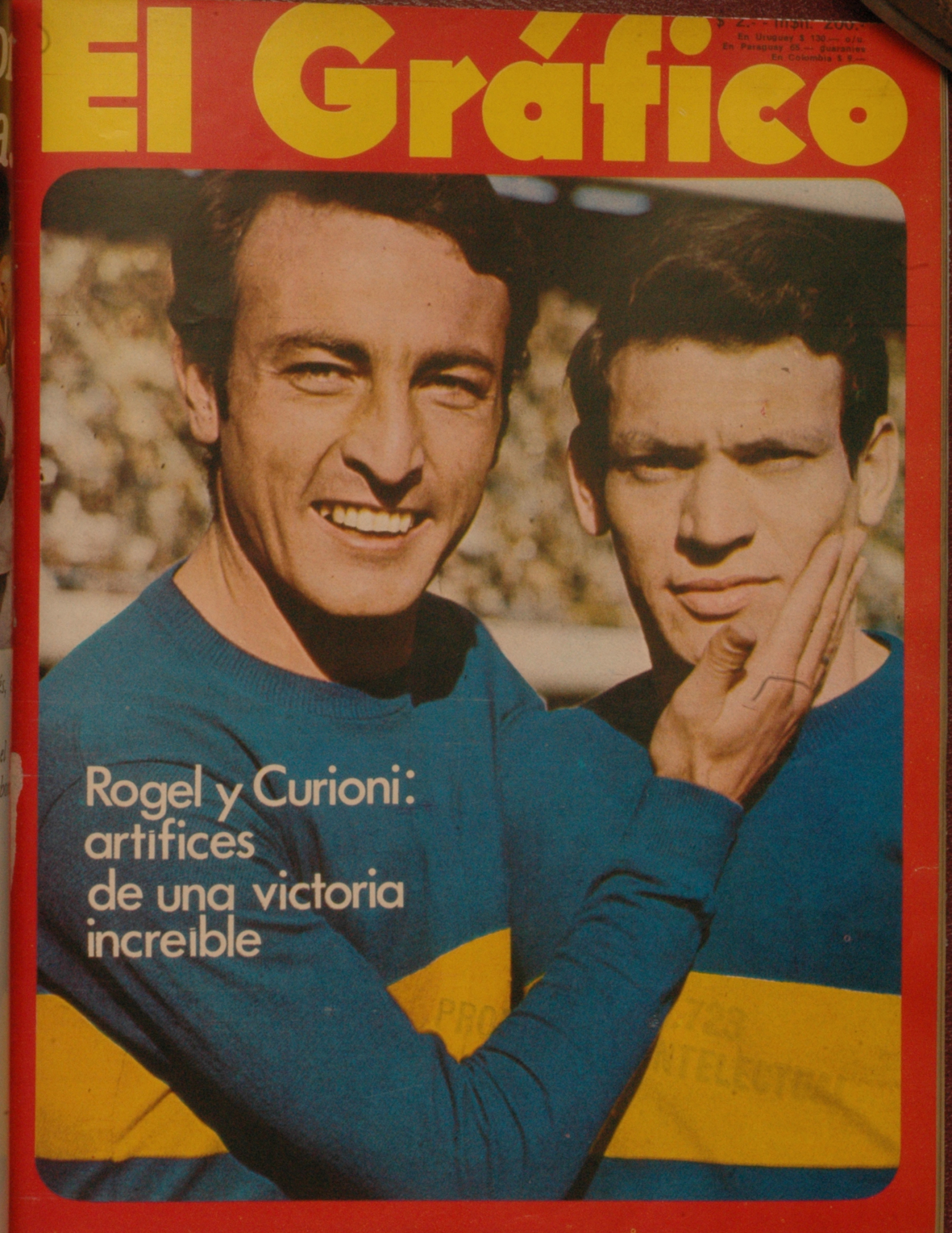 El Grafico del 28 de Marzo de 1972. Edicion 2738